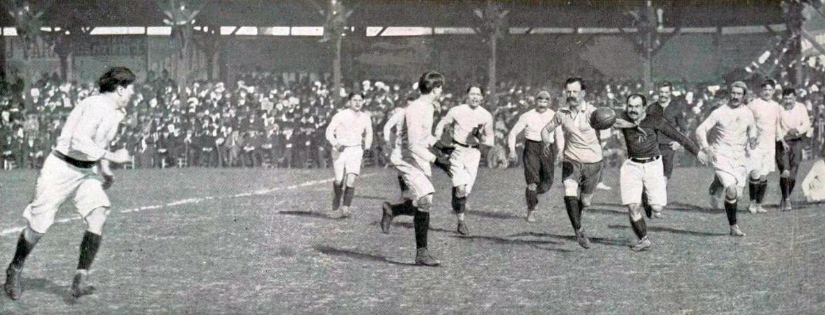 1909 (4 avril), Giaccardy sur le point d'être plaqué passe le ballon à un de ses coéquipiers bordelais (Stade des Ponts Jumeaux).